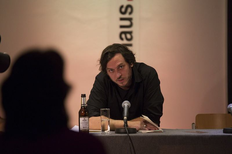 Christoph Danne (Literaturhaus Dortmund, 2014)